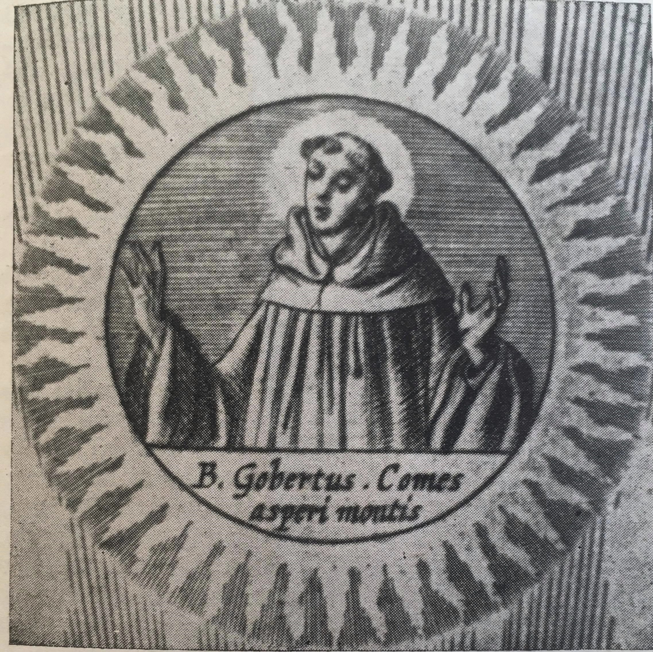 Il s'agit d'une gravure datant de 1659 de Gobert d'Aspremont. Moine à l'Abbaye de Villers-en-Brabant, il sera vu par les autres moines de l'abbaye comme un saint. C'est d'ailleurs comme ça qu'il est représenté sur cette gravure.